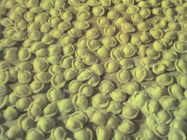 orecchiette